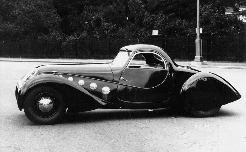 Peugeot 402 Darl'Mat Special Sport carrossée par Pourtout